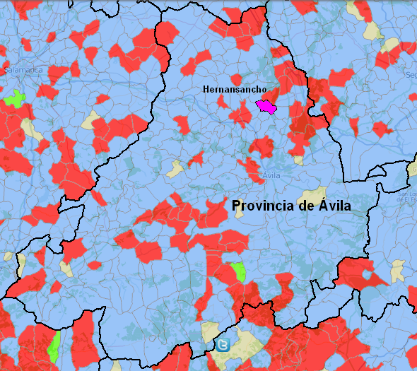 Hernansancho en color magenta, en la provincia de Ávila. Primer ayuntamiento que gobierna la formación Unión, Progreso y Democracia (UPyD). Tras las elecciones municipales y autonómicas del 22-05-2011.